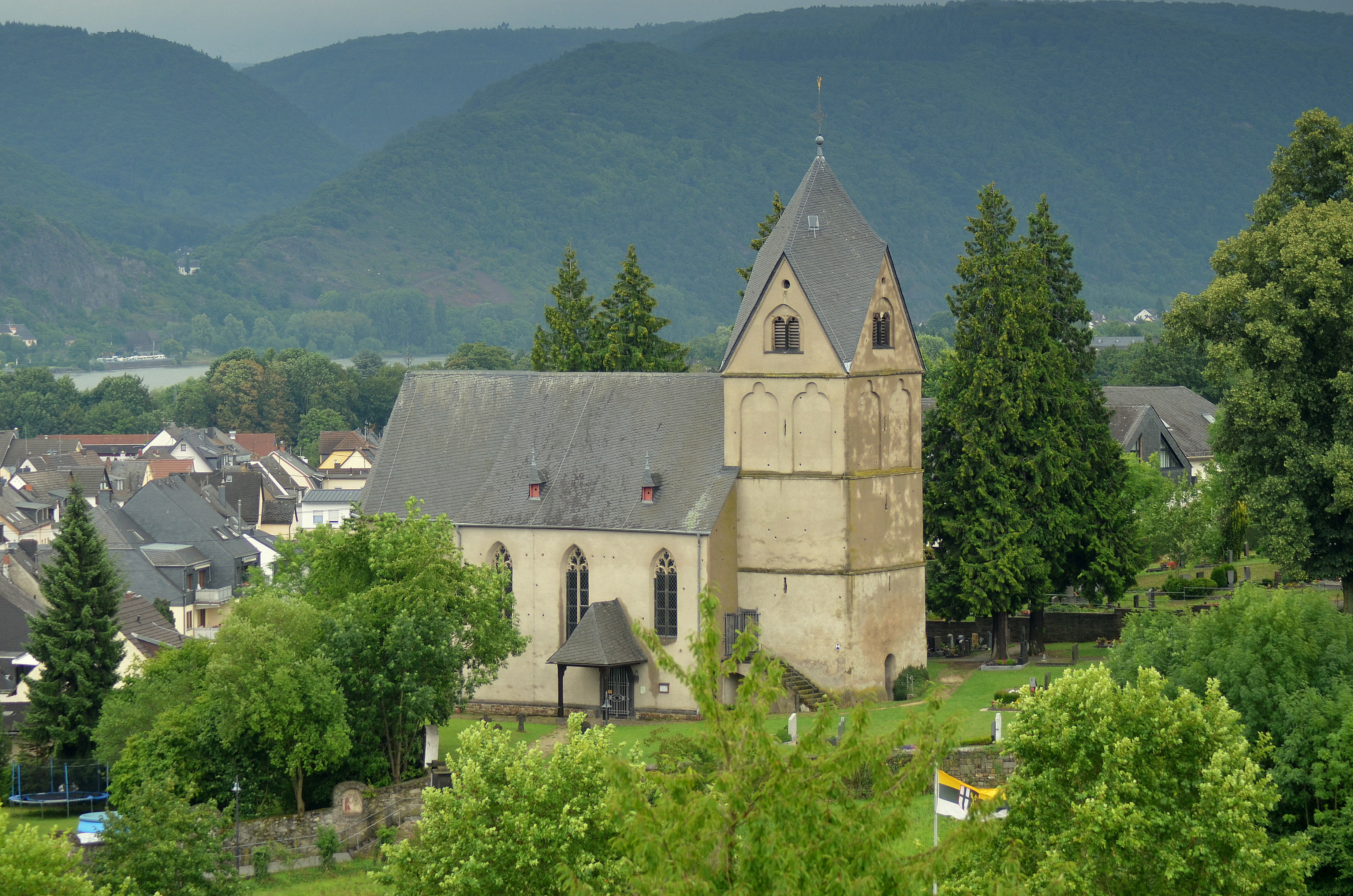 Sint-Dionysiuskerk